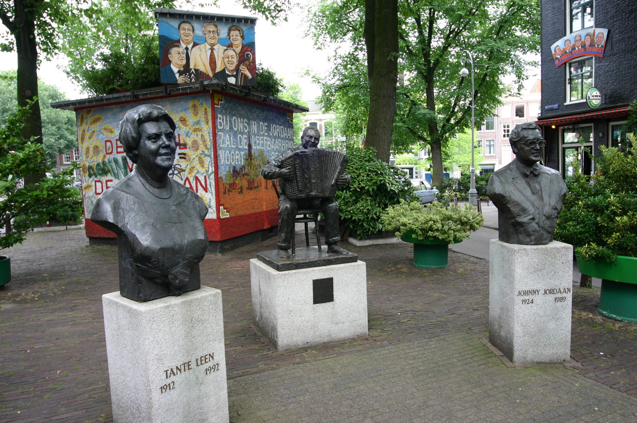 Johnny Jordaanplein. De bronzen standbeelden van Johnny Jordaan (1991, Kees Verkade), Tante Leen (1994, Kees verkade) en Johnny Meijer (1996, Rob Cerneüs). Categorie:Wikipedia:Afbeeldingen/Gebruiker:Luijt Categorie:Afbeelding Amsterdam